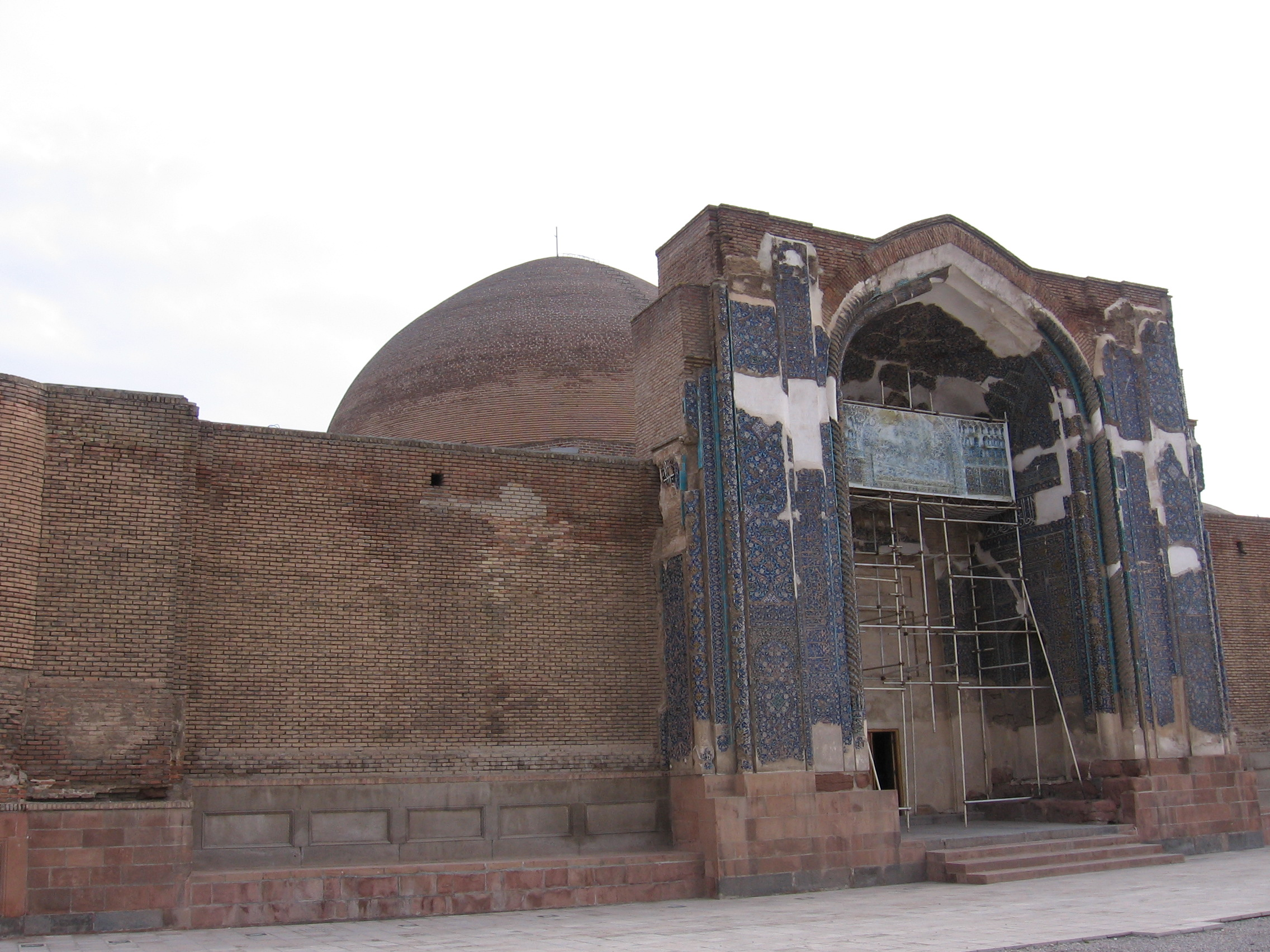 Eyvan of Blue Mosque (Tabriz)